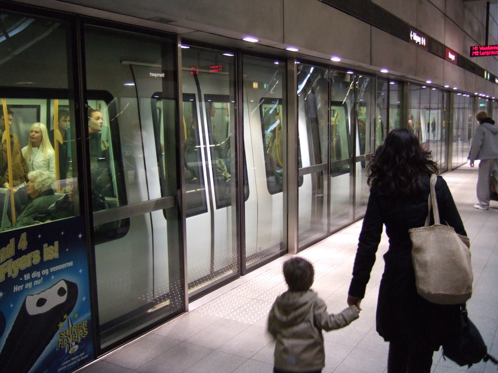 Taken by M. Wickett, Denmark